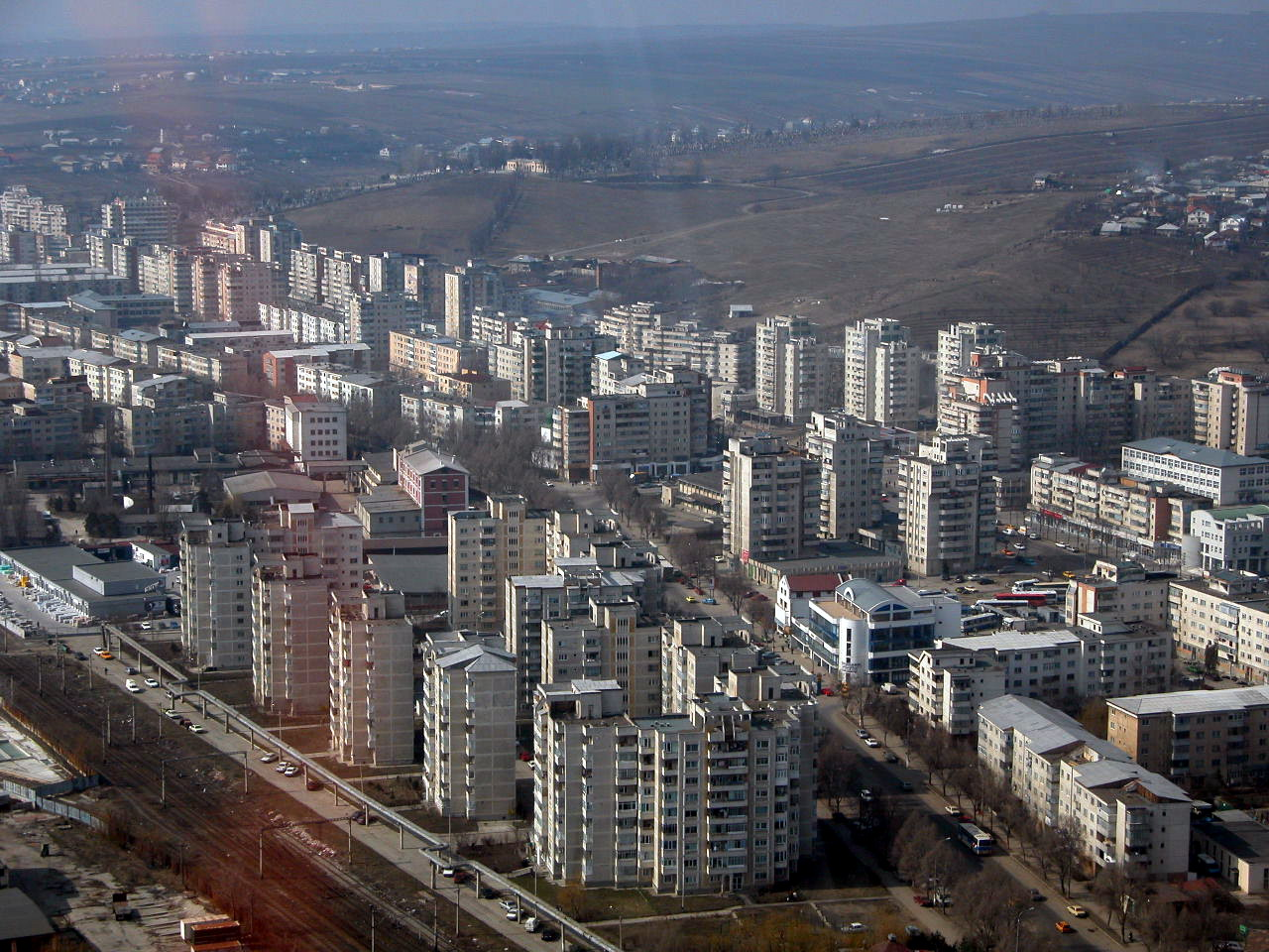 Iasi, view to the distrikt Moara de Foc , Iaşi, Romania